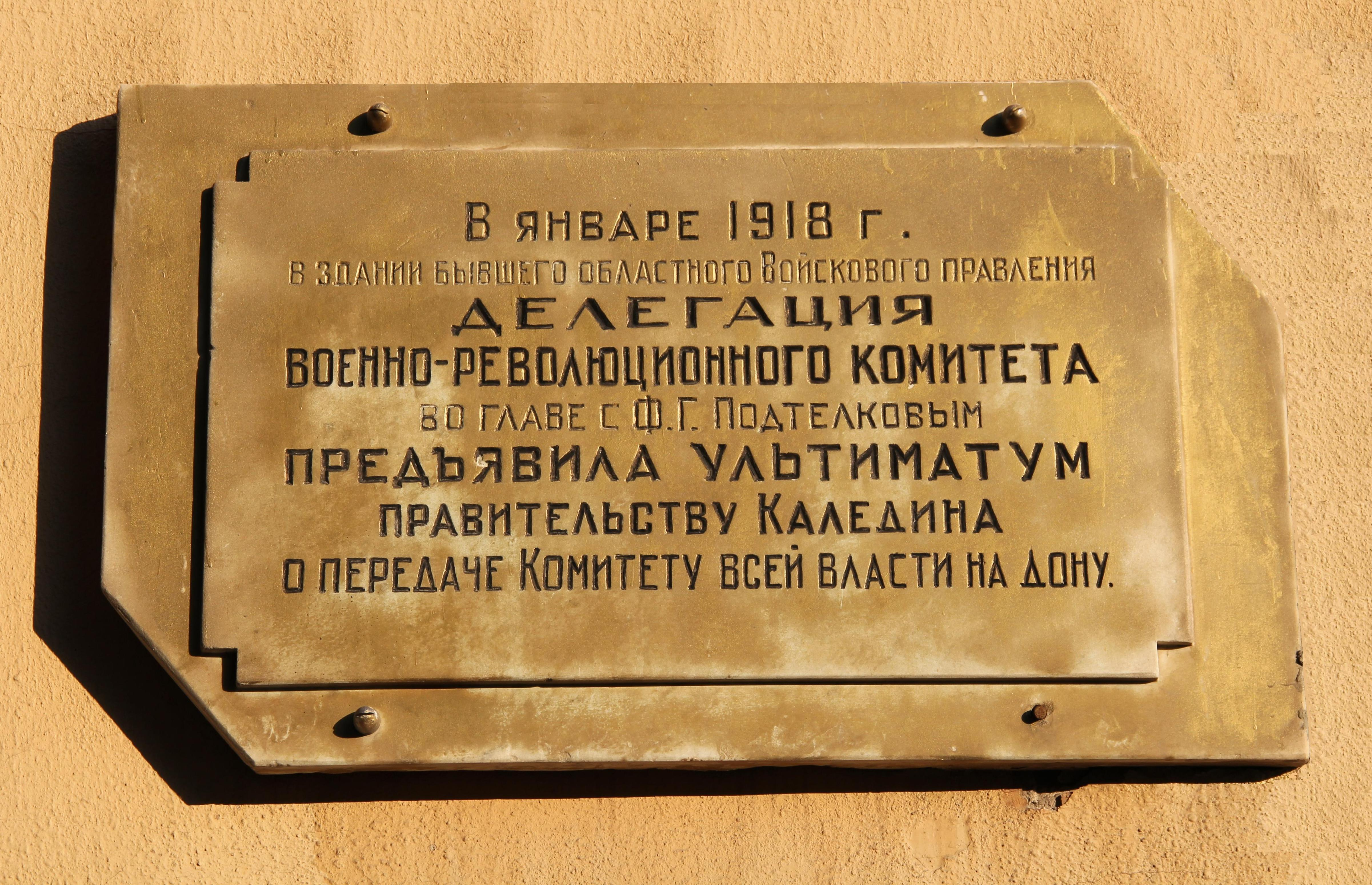 На против музея Донского Казачества, Мемориальная доска про действия Подтелкова М.Г. в январе 1918г.